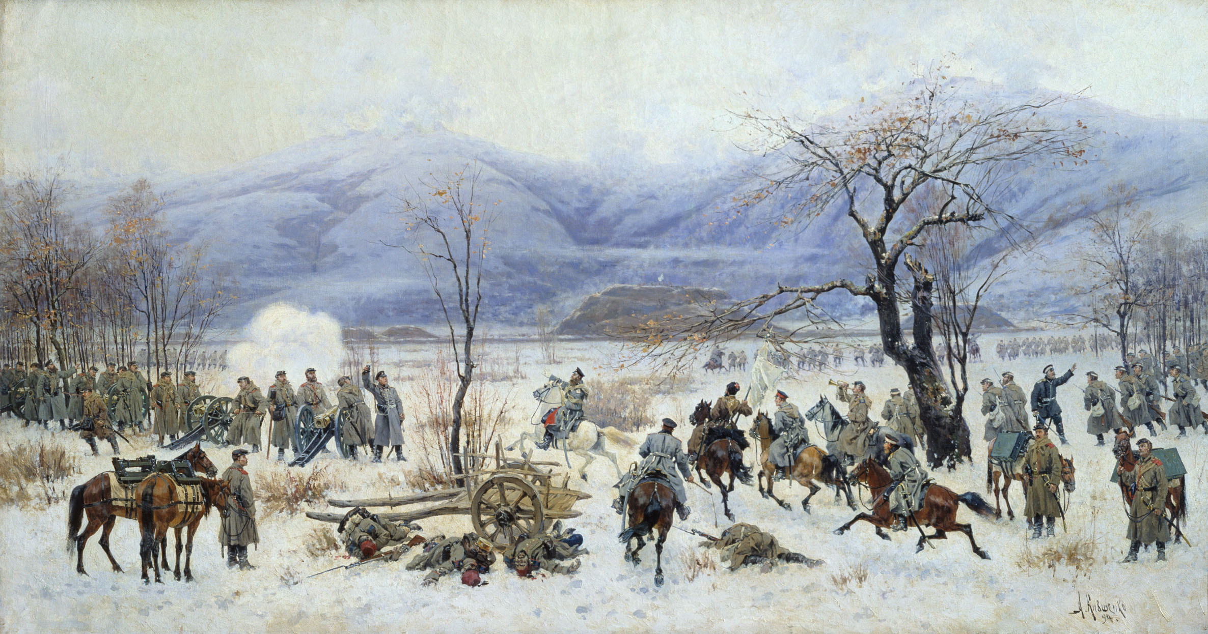 Сражение у Шипки-Шейново 28 декабря 1877 года.